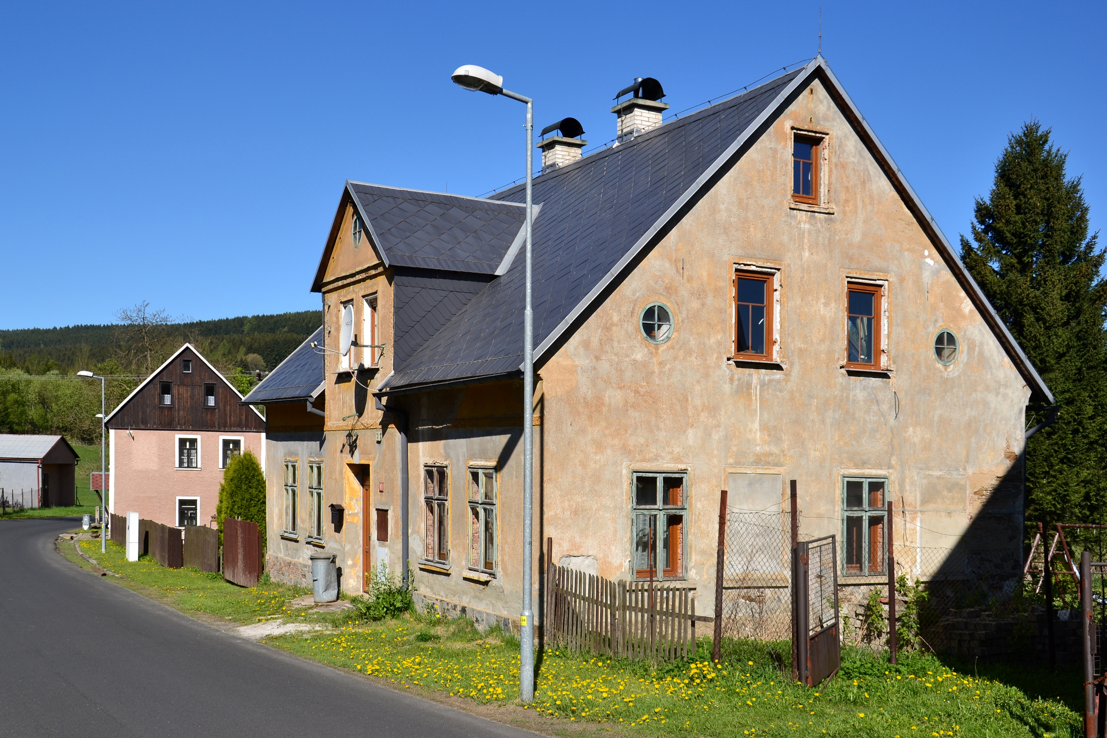 České Hamry – domy ve středu vesnice v ulici k Loučné a hraničnímu přechodu Hammerunterwiesenthalu